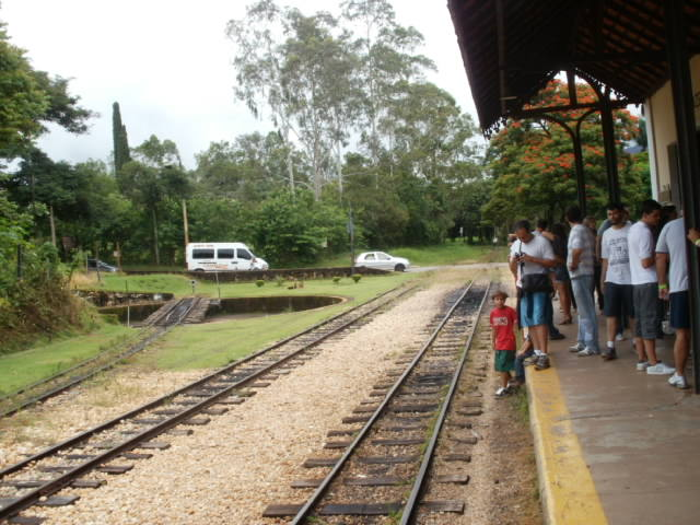 Vista da Estrada de Ferro Oeste de Minas, que liga Tiradentes a São João del-Rei. Foto tirada em Tiradentes, Minas Gerais, Brasil.